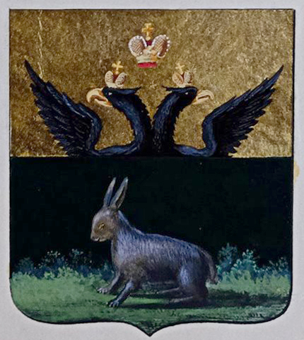 Беларуская (тарашкевіца): Копысь (Kopyś). Герб места